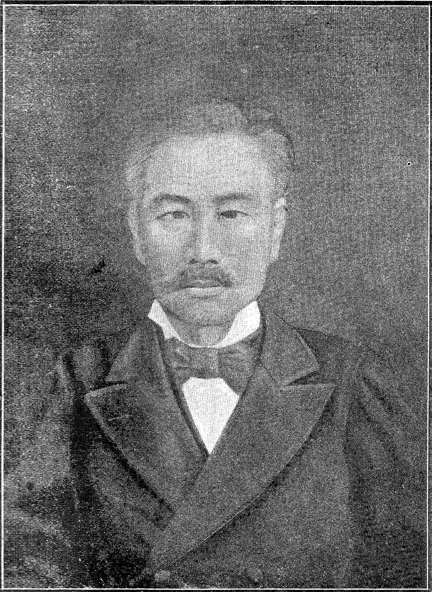 野村文夫（1836 - 1891）は、明治前期のジャーナリスト。